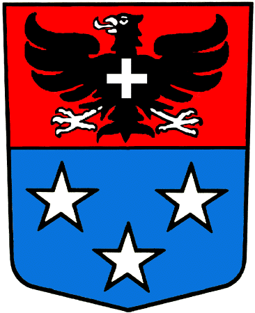 Wappen von Vouvry Kanton Wallis Schweiz